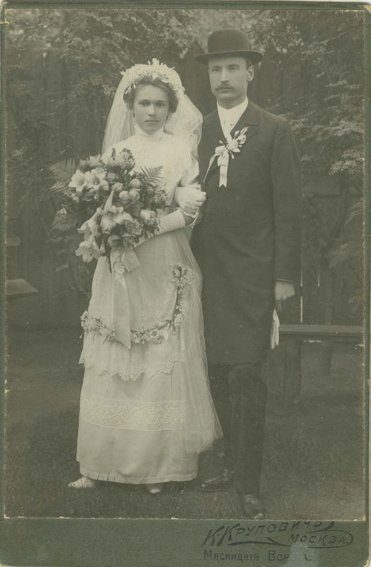 Antanas Žukauskas-Vienuolis (1882–1957) ir Sofija Jackūnaitė-Žukauskienė (1894–1977) on their wedding day